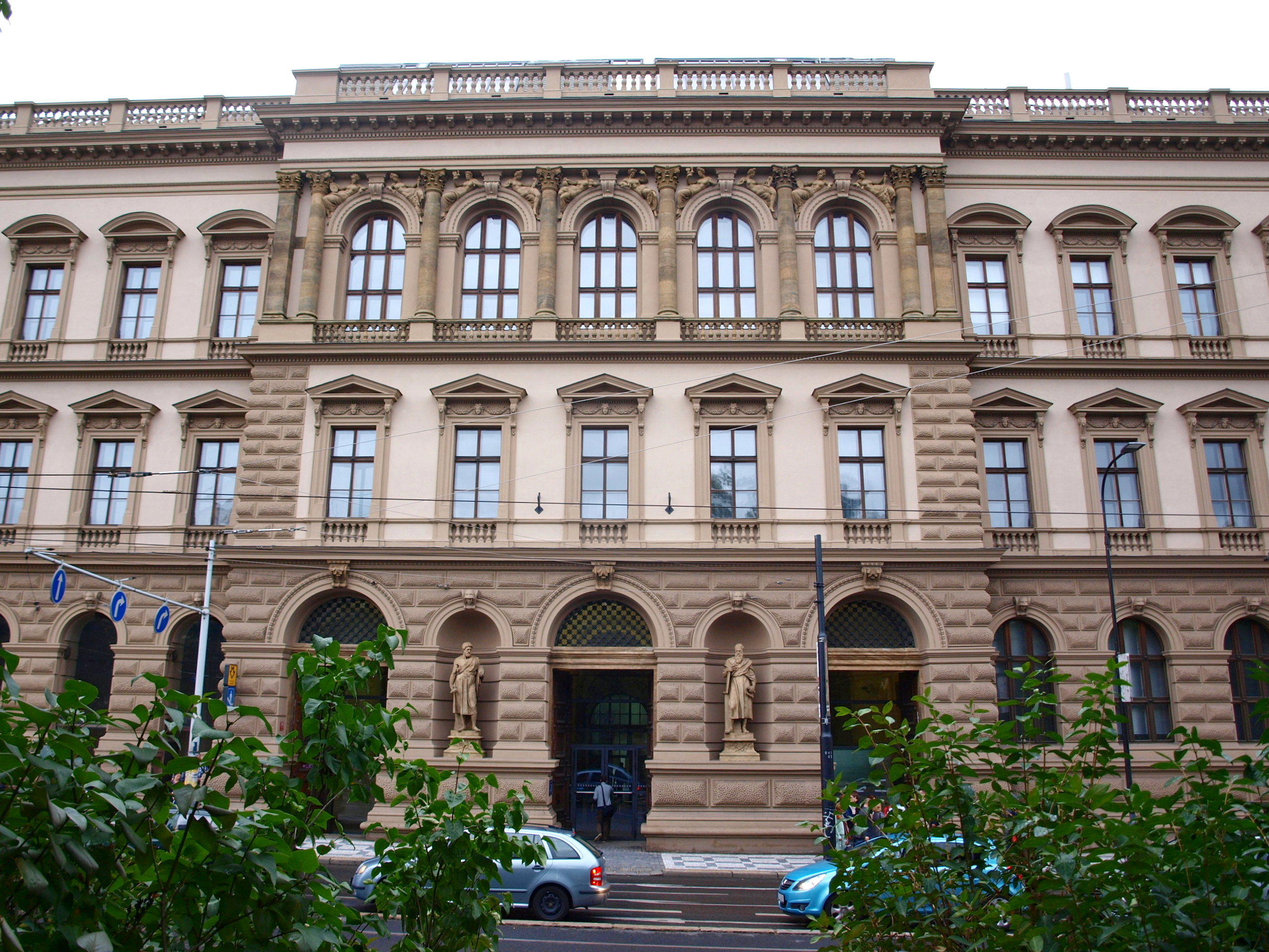 Karlovo náměstí, ČVUT